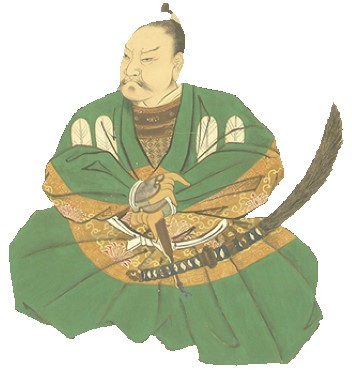 菊池持朝の肖像。